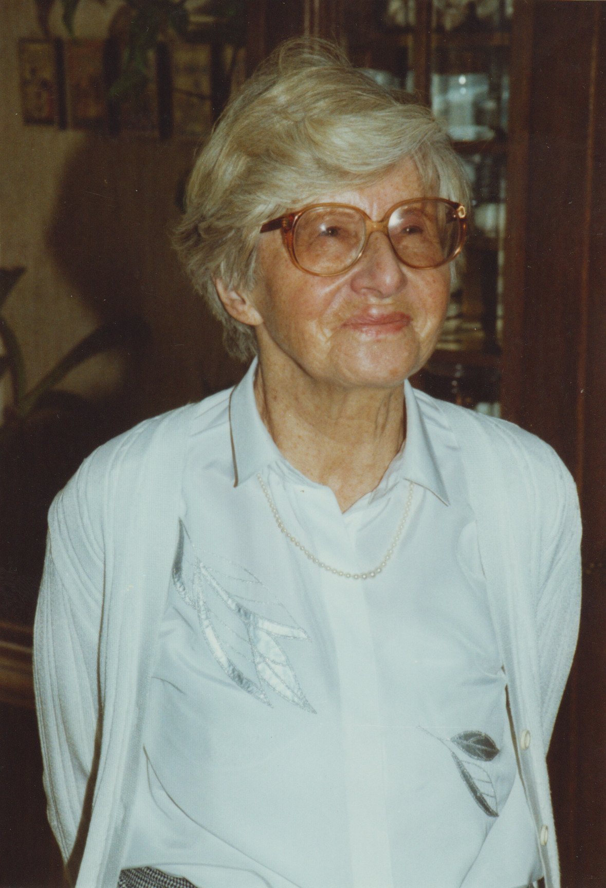 Annemarie Jeanette Neubecker (1908–2001), deutsche Klassische Philologin und Musikwissenschaftlerin